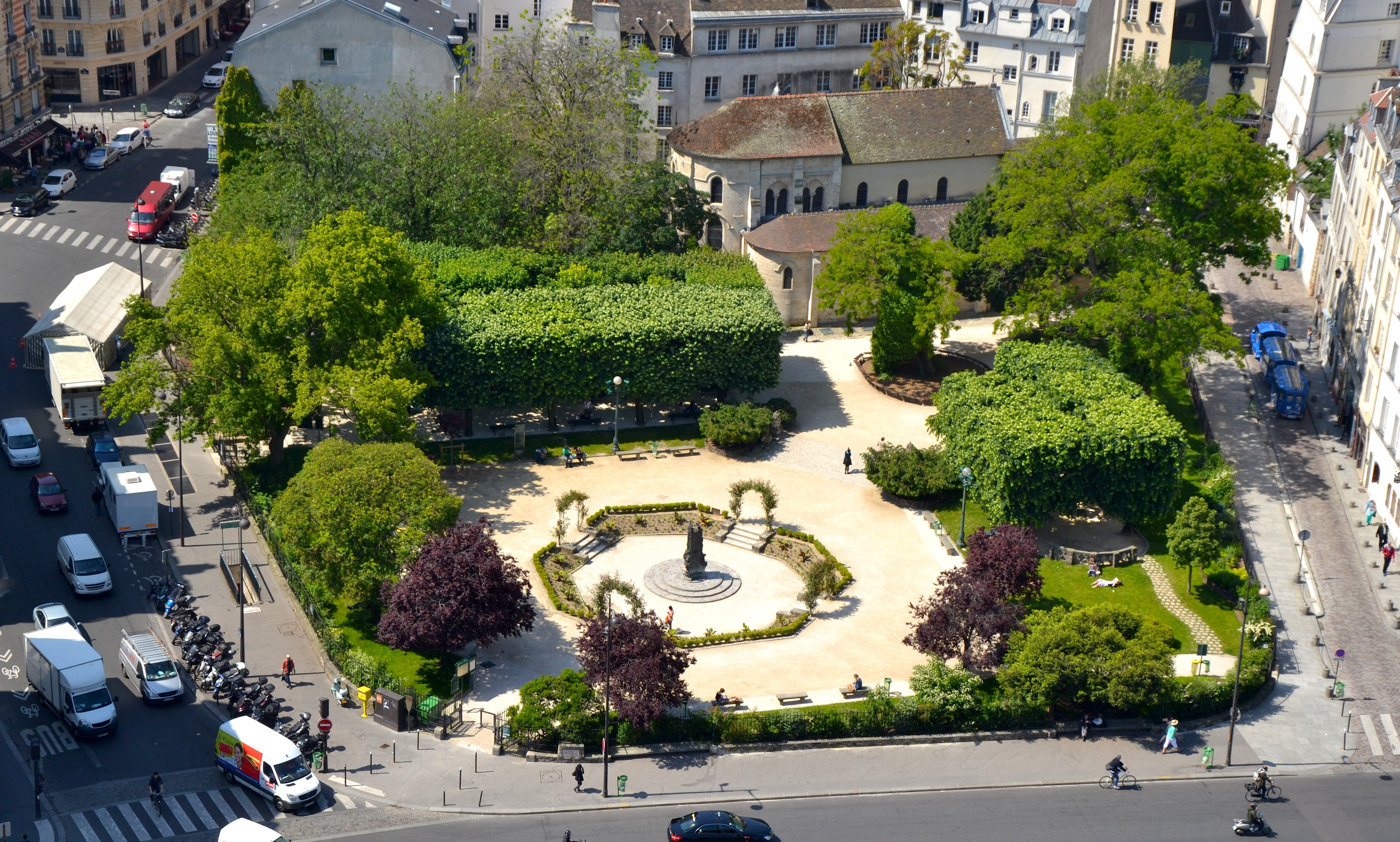 Vue générale du square René-Viviani-Montebello vu depuis la tour sud de la Cathédrale Notre-Dame de Paris par une journée de juin ensoleillée